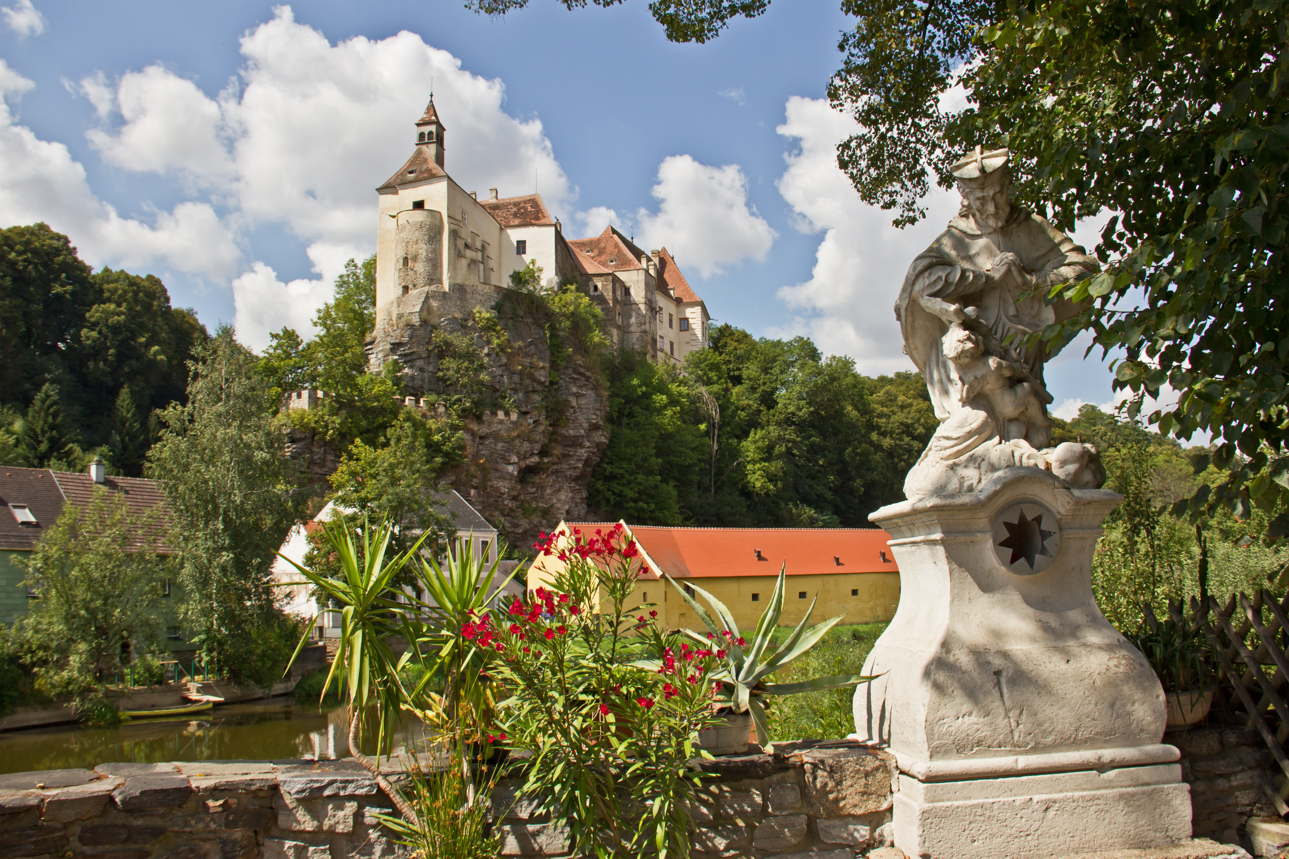 Die Burg Raabs ist eine langgestreckte Spornburg, die auf das 11. Jahrhundert zurückgeht.